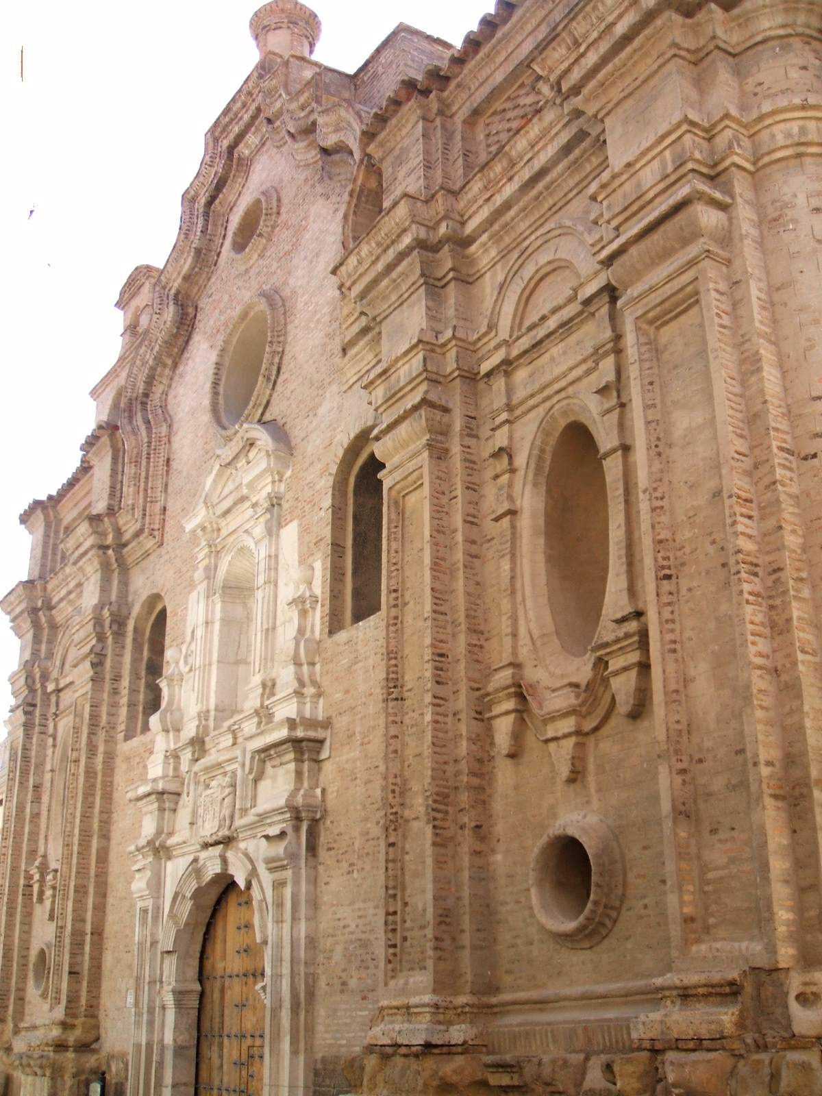 Iglesia de San Atilano (Centro Sociocultural), en Tarazona (Zaragoza)